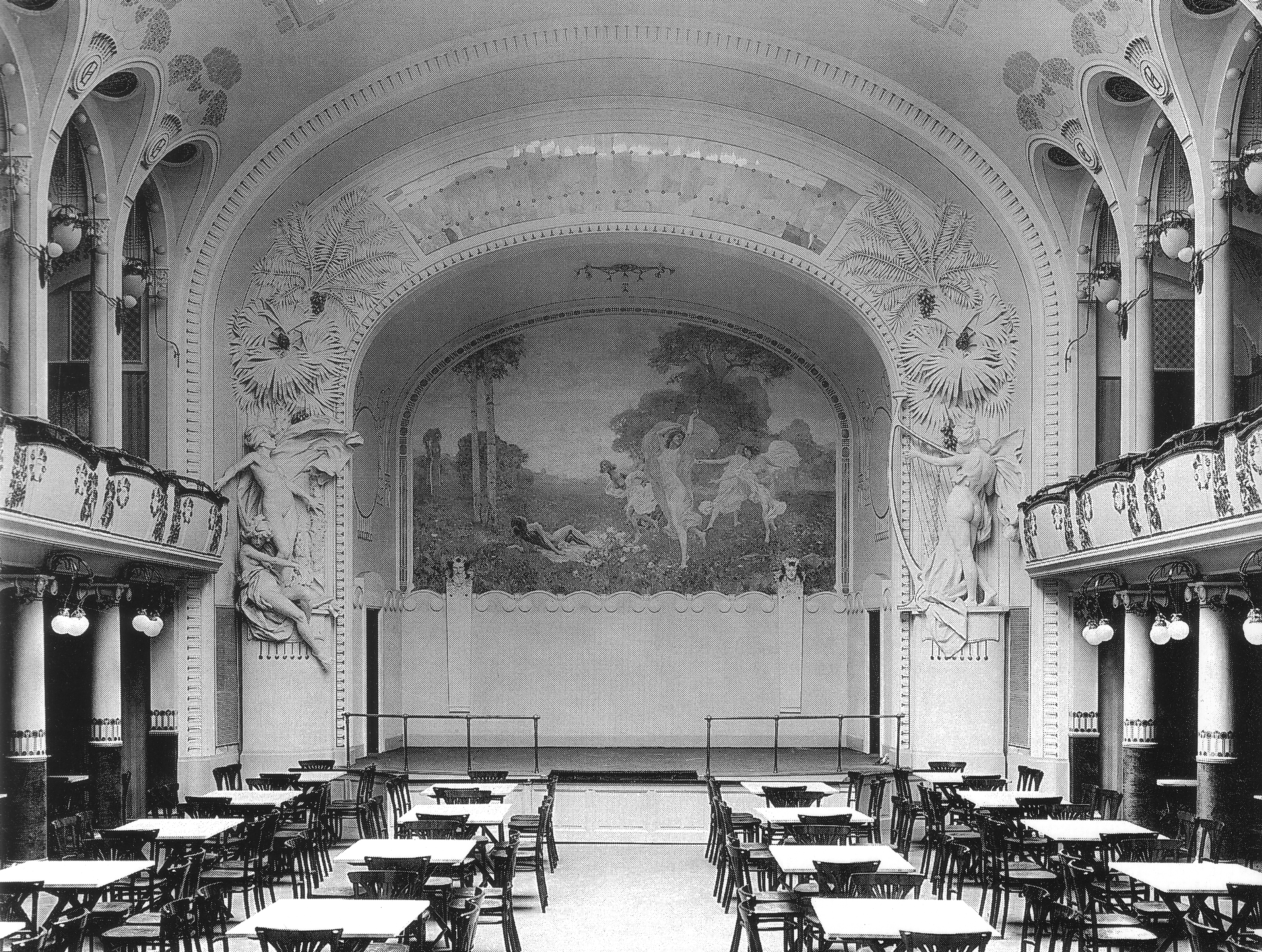 Festsaal des Hotel Central in Prag, destroyed cca 1927